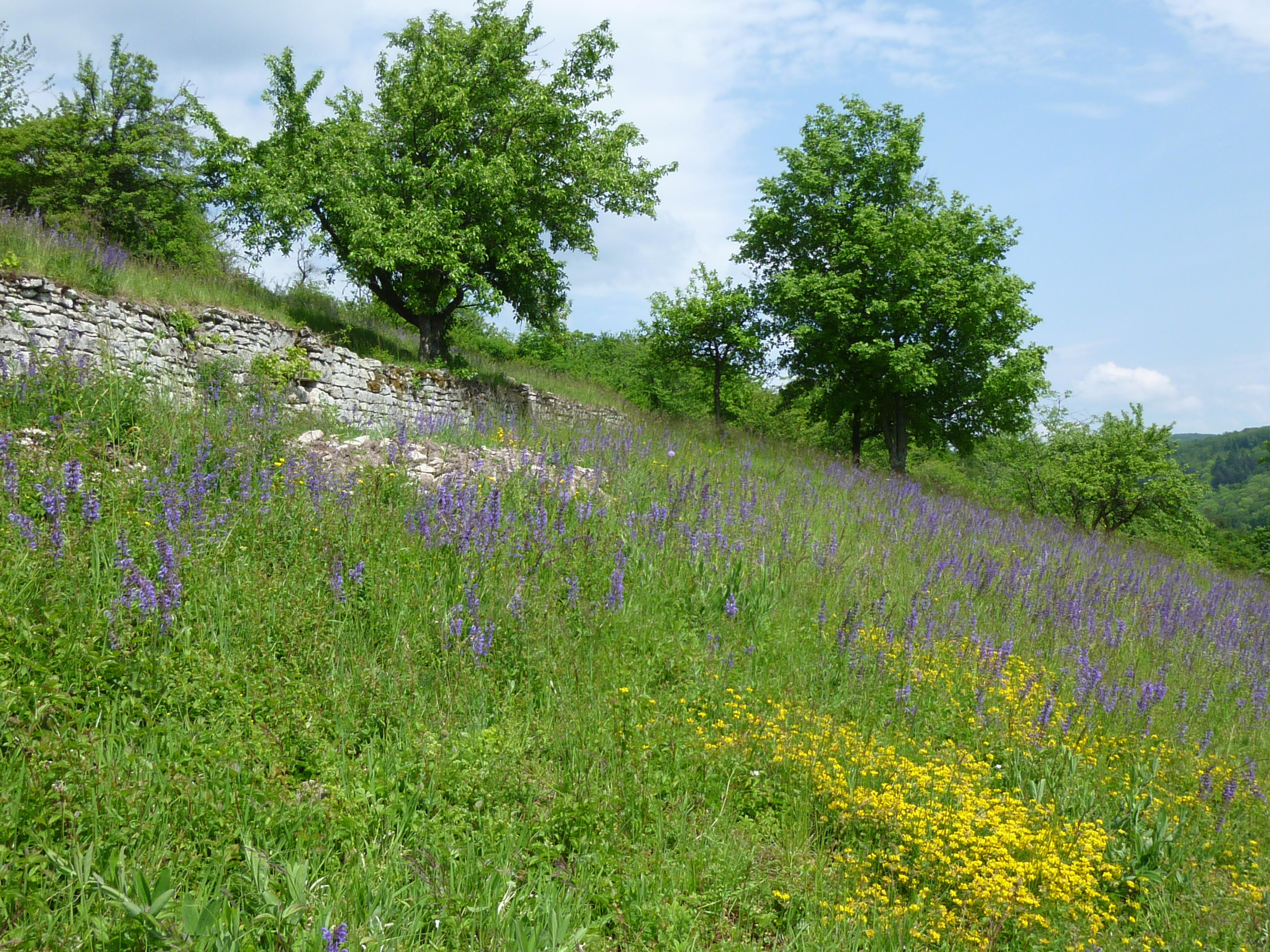 Trockenmauern und Salbei-Glatthaferwiesen Naturschutzgebiet "Unterer Berg"